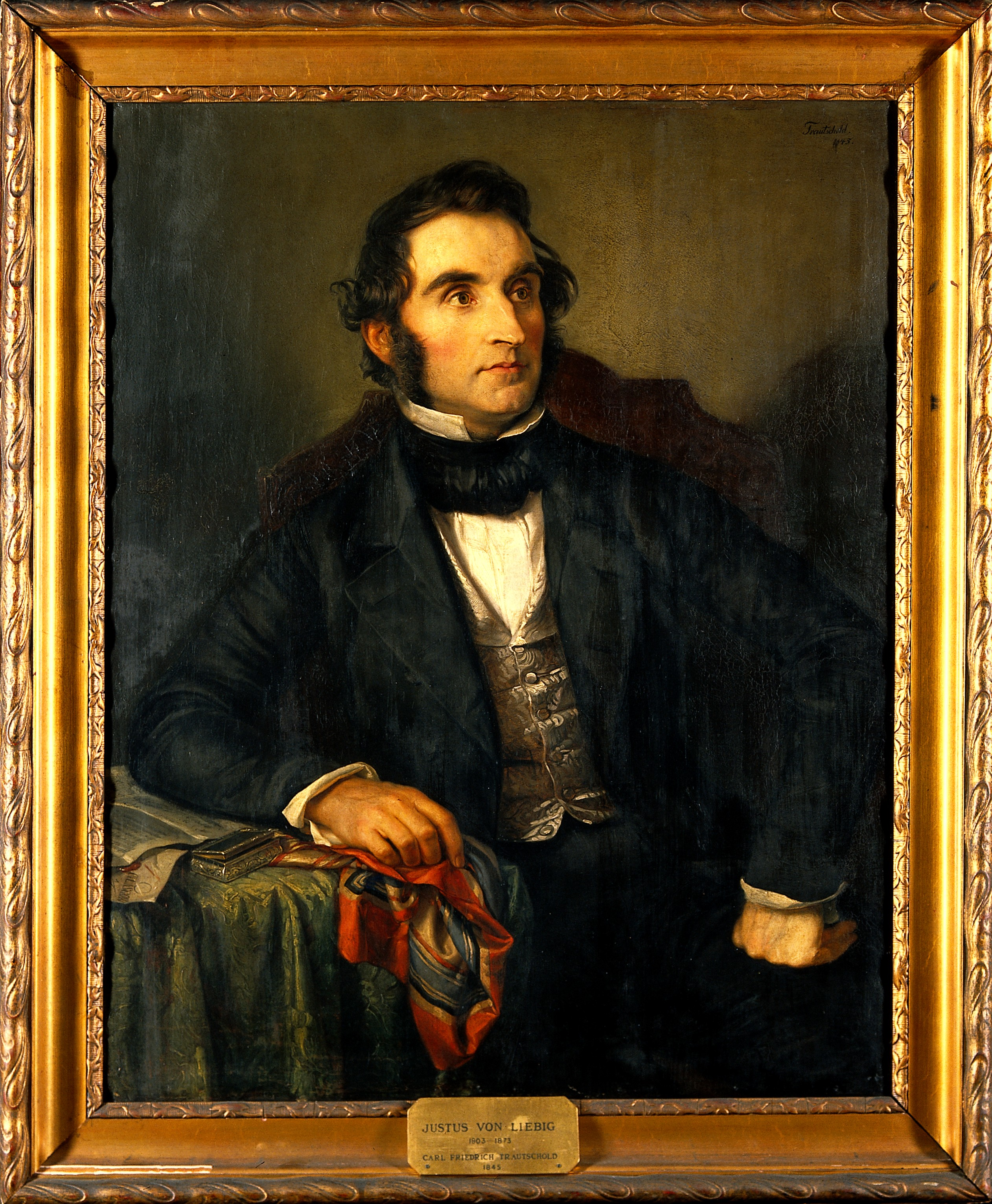 Justus von Liebig (1803-1873), chemist. Oil painting by Carl Friedrich Wilhelm Adolph Trautschold. Iconographic Collections Keywords: Carl Friedrich Wilhelm Adolph Trautschold; Justus Liebig